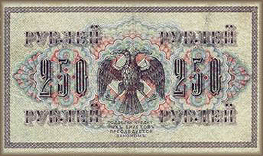 Купюра Временного правительства. Россия. 1917 г. 250 р. Реверс. Свастика